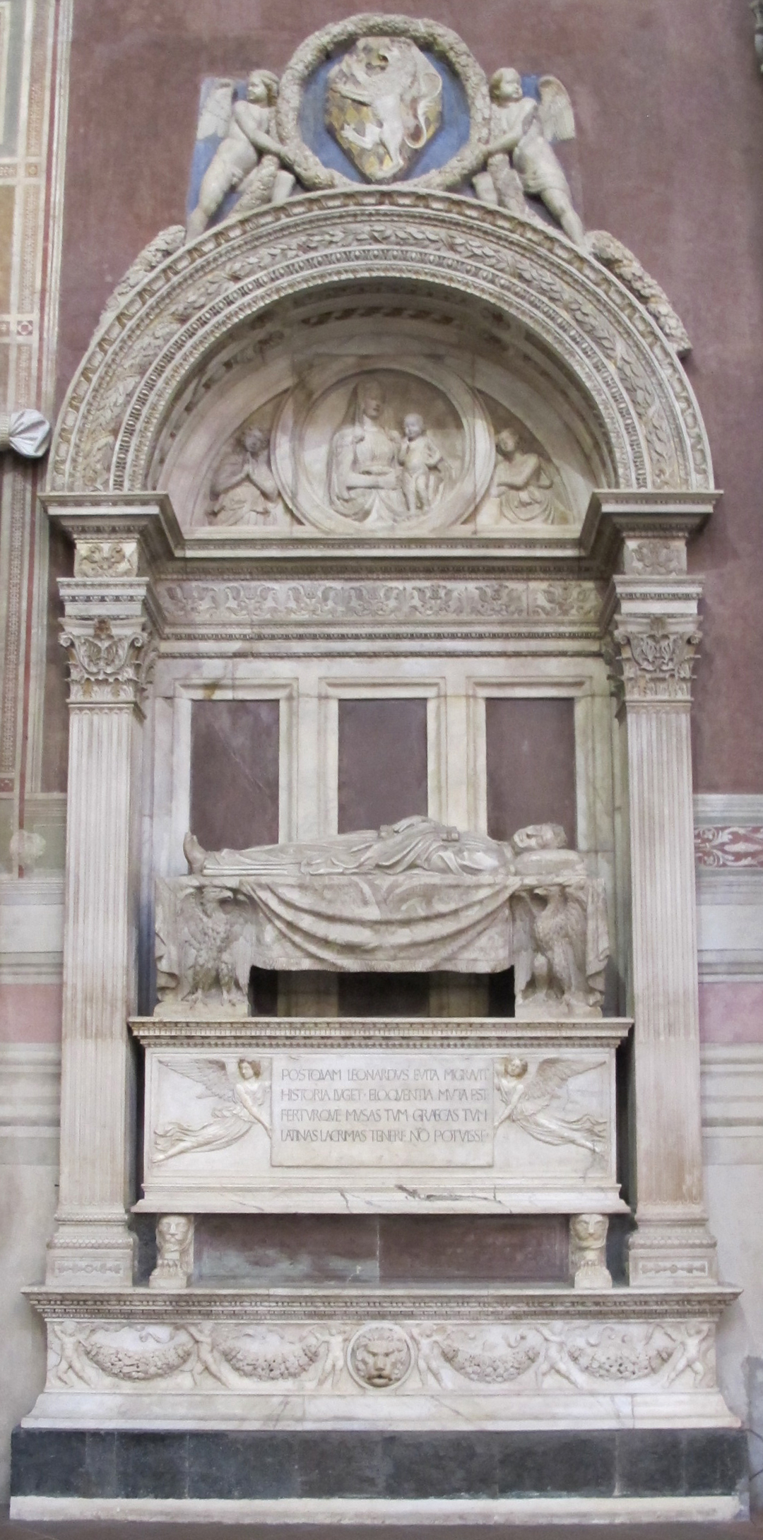 Bernardo rossellino, tomba bruni